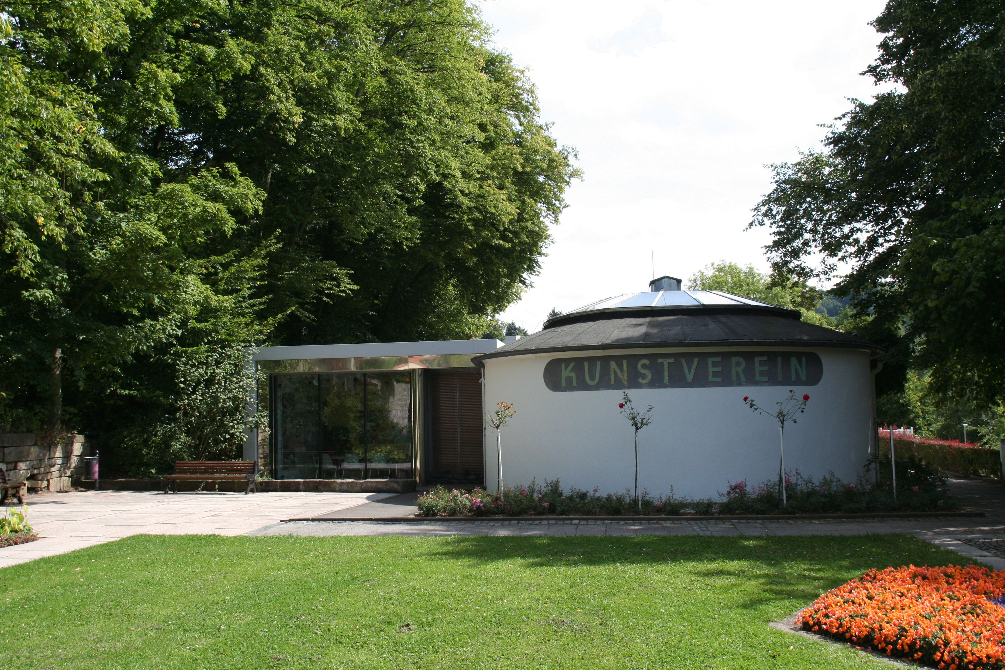 Kunstverein am Hofgarten, Park 4a in Coburg